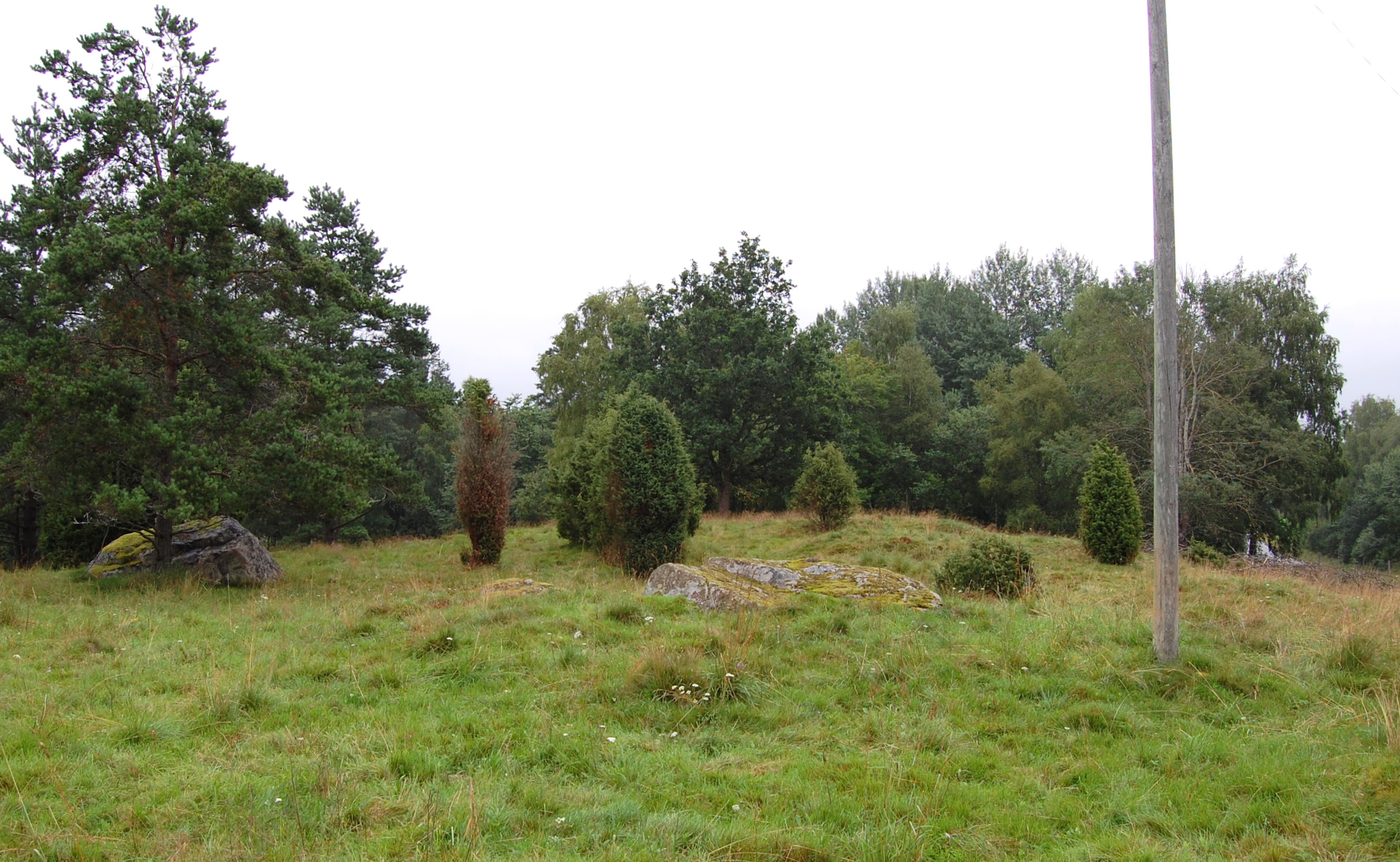 Gräberfeld von Hjälmseryd, östlich der Landstraße 30